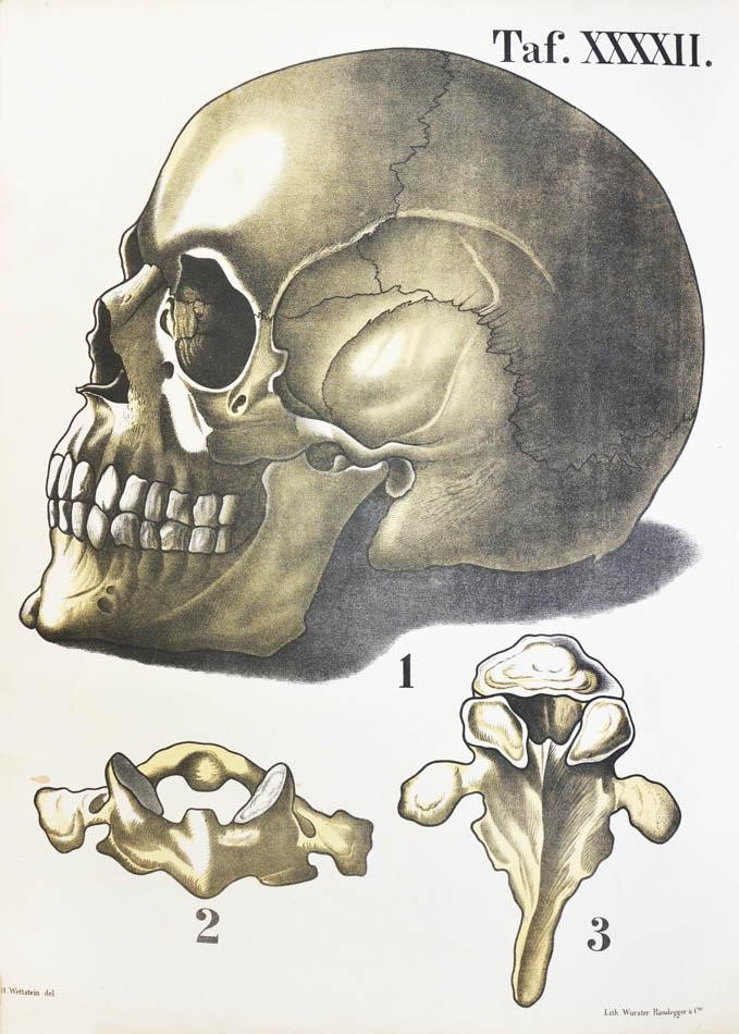 Tafel Naturkunde Sekundarschule von Heinrich Wettstein, Schweiz, um 1880